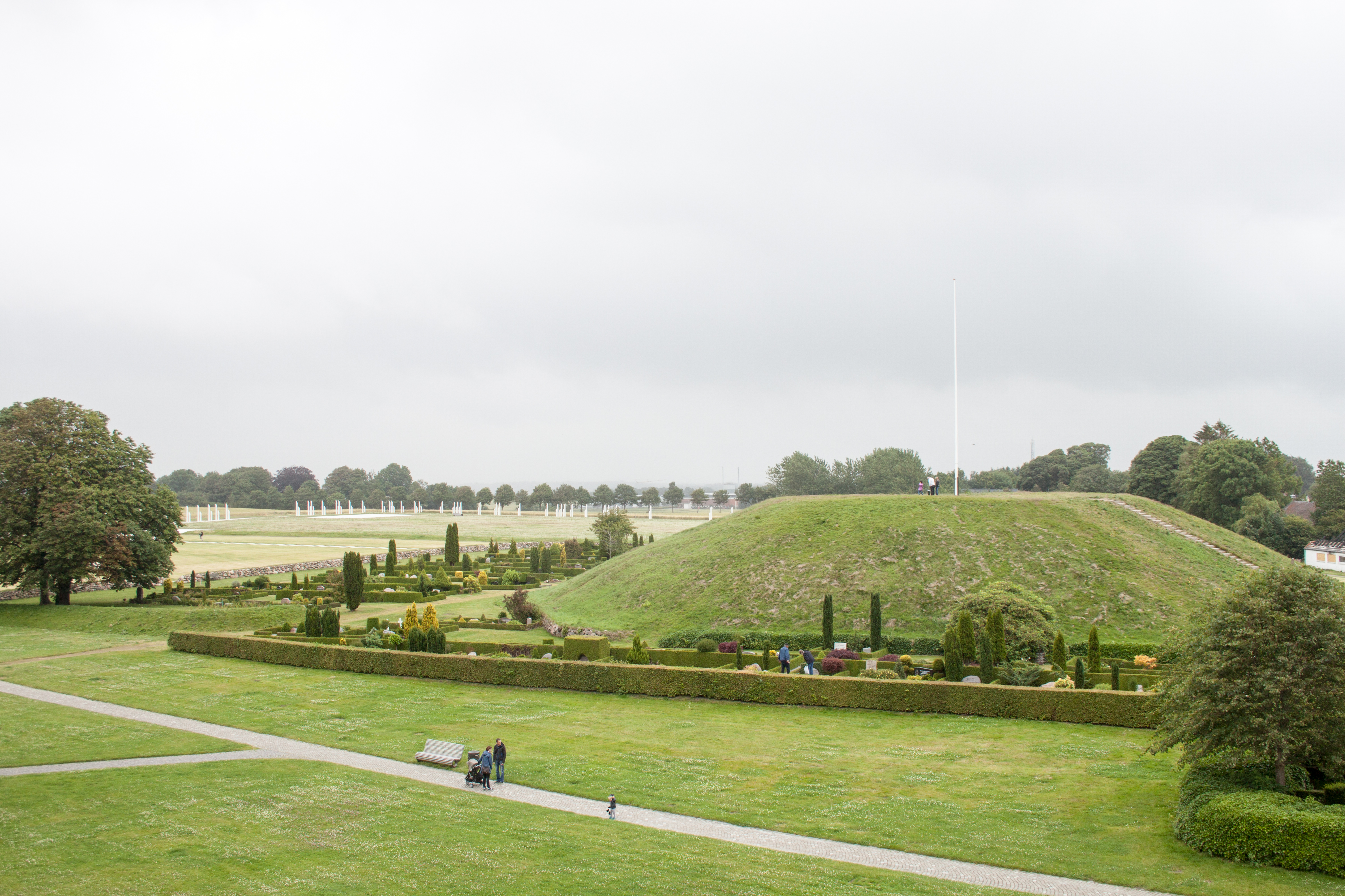 Kongernes Jellinglabel QS:Len,"Kongernes Jelling" label QS:Lhu,"Látkép a kiállítóközpont tetejéről"